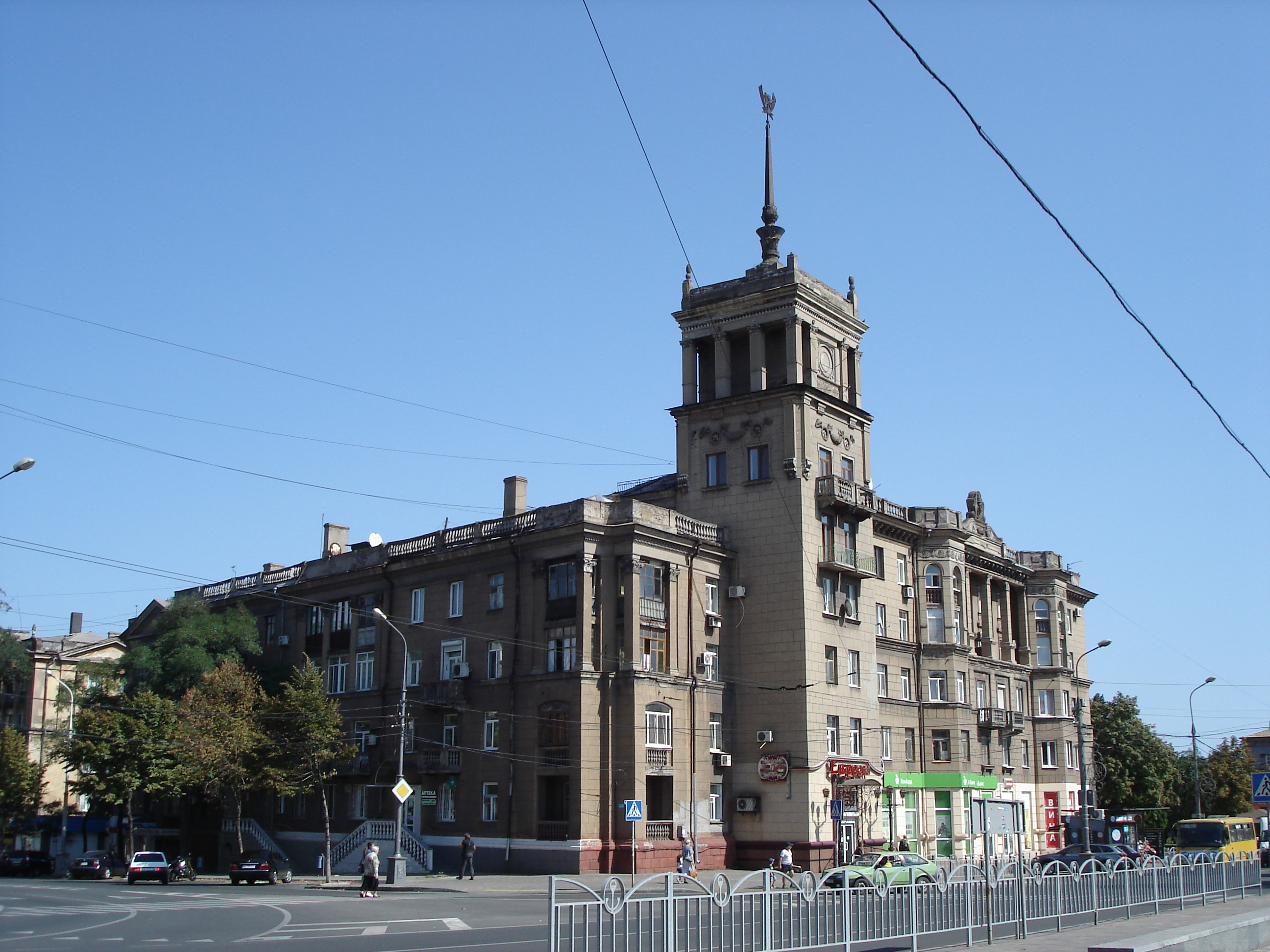 Житловий будинок зі шпилями, Маріуполь, вул. Архипа Куїнджі (Артема), 35